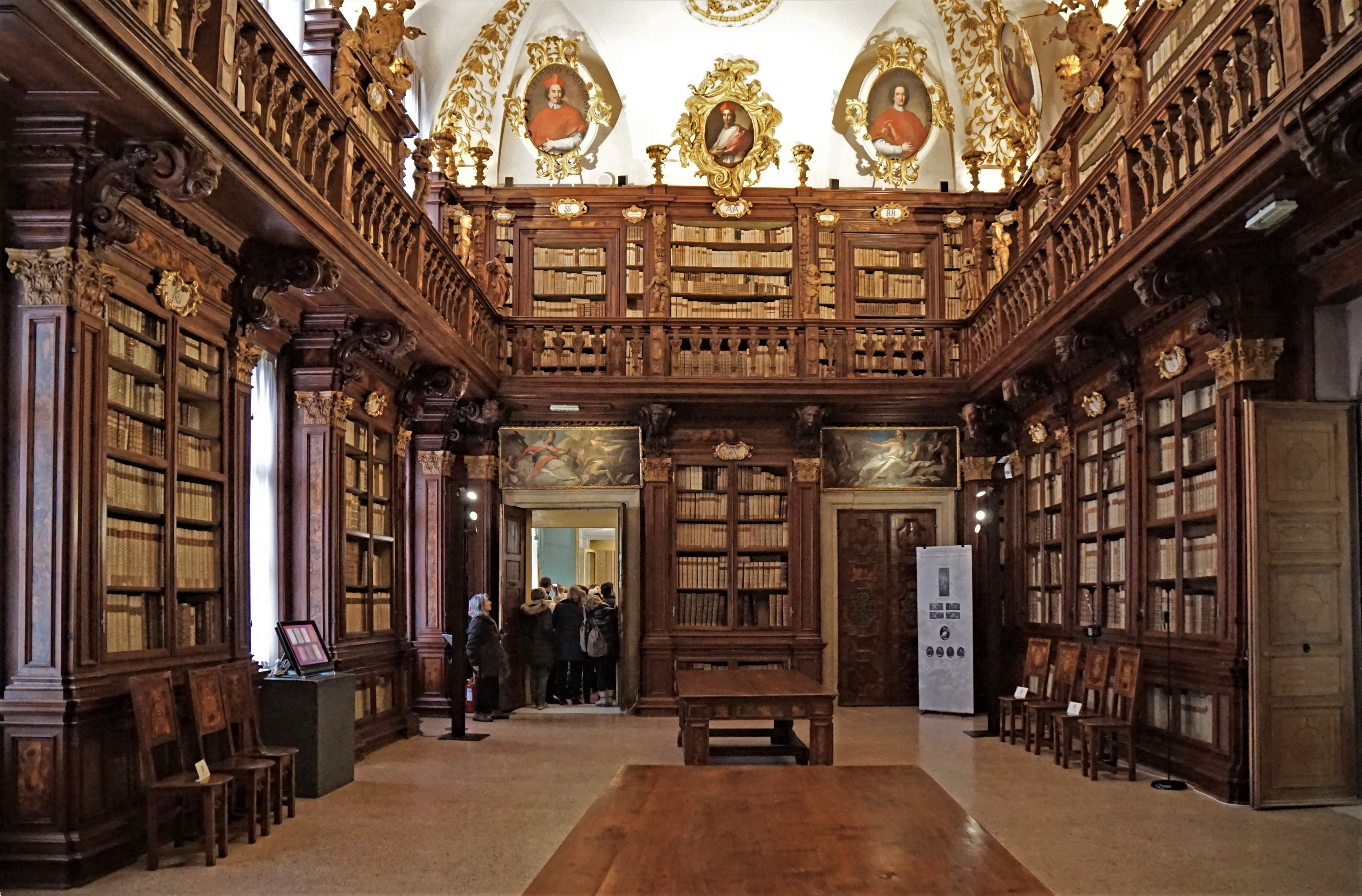 Palazzo Patriarcale (Udine), Blick in die Bibliothek